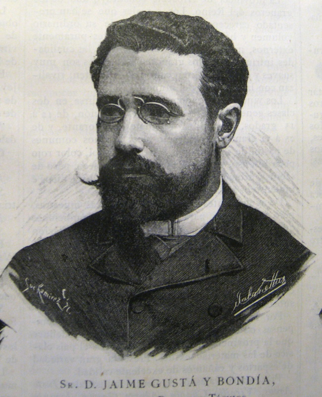 Imatge de Jaume Gustà i Bondia (Barcelona, 1854 - 1936), Arquitecte. Dissenyador del Palau de la Indústria per a l'exposició universal de 1888 (Barcelona).